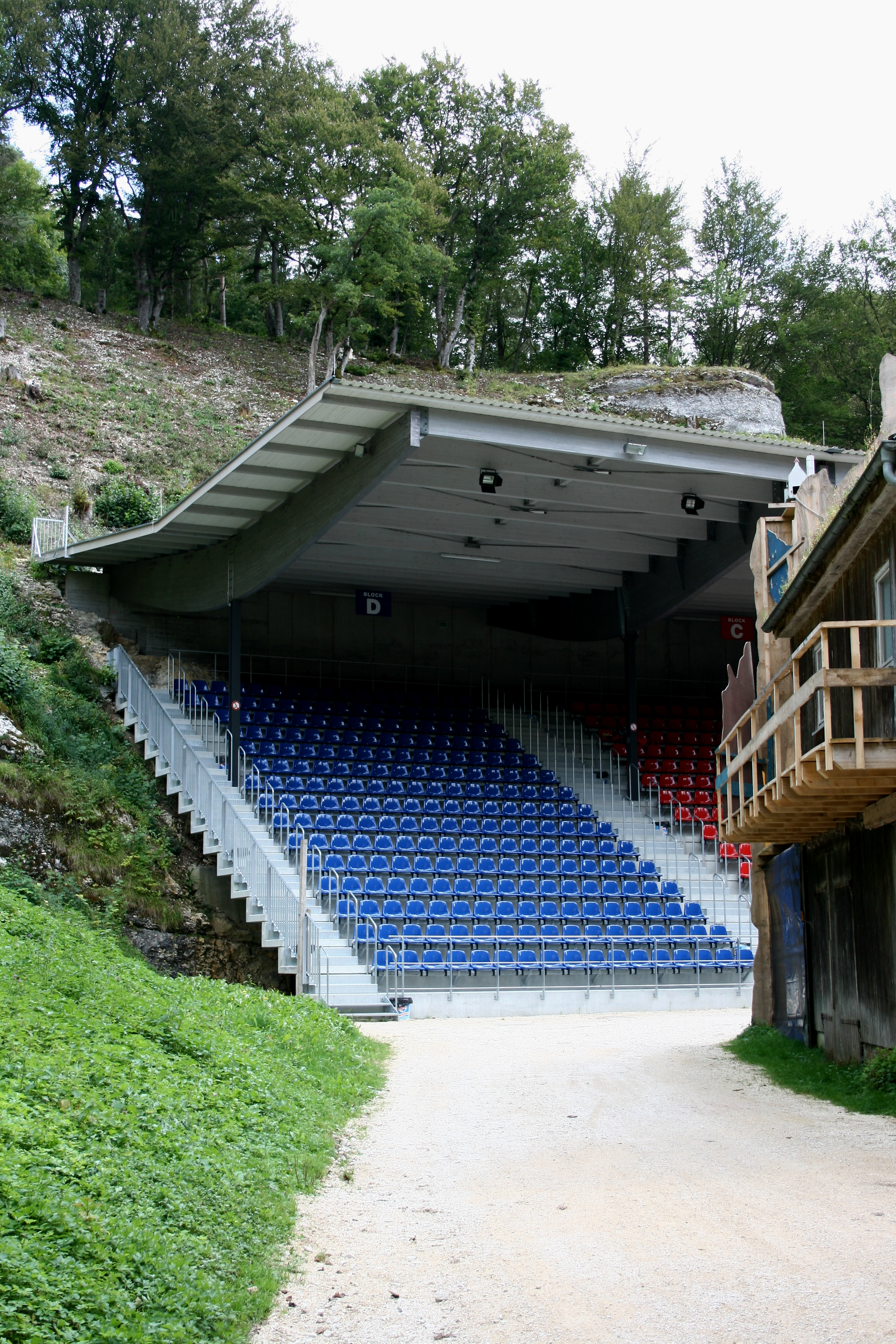 Die neue Zuschauertribüne im Naturtheater Hayingen im Landkreis Reutlingen bietet seit 2008 Platz für fast 1000 Besucher